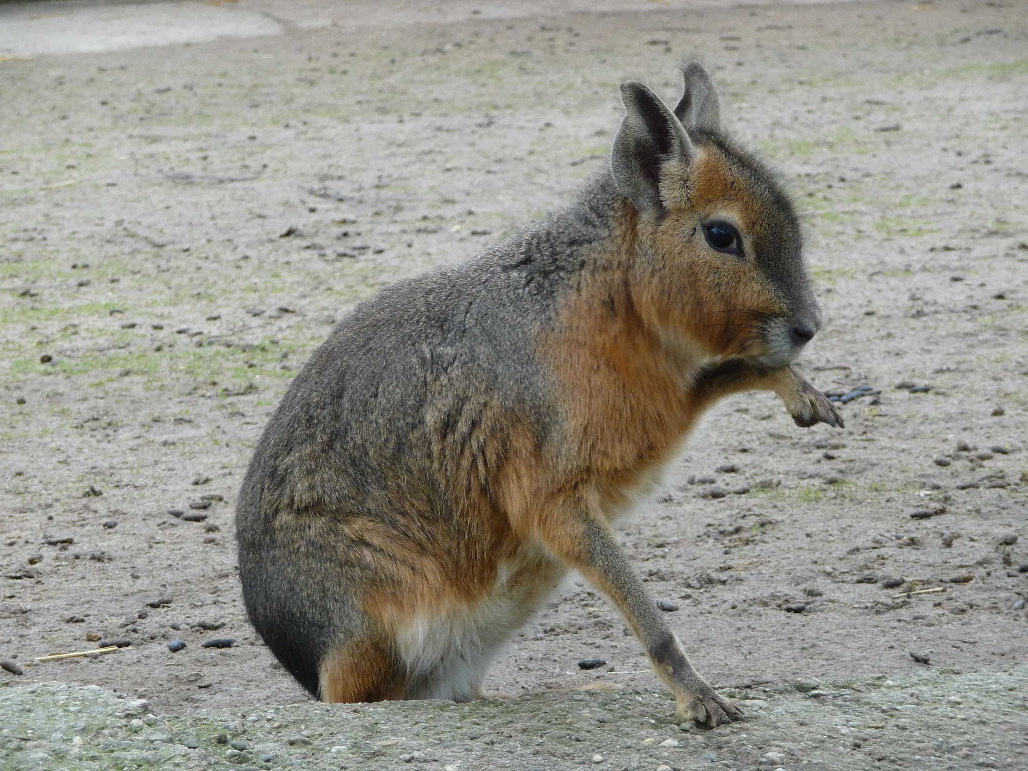 Großer Pampashase (Dolichotis patagonum), fotografiert im Tier- und Vogelpark Forst e. V. (Baden-Württemberg, Deutschland)